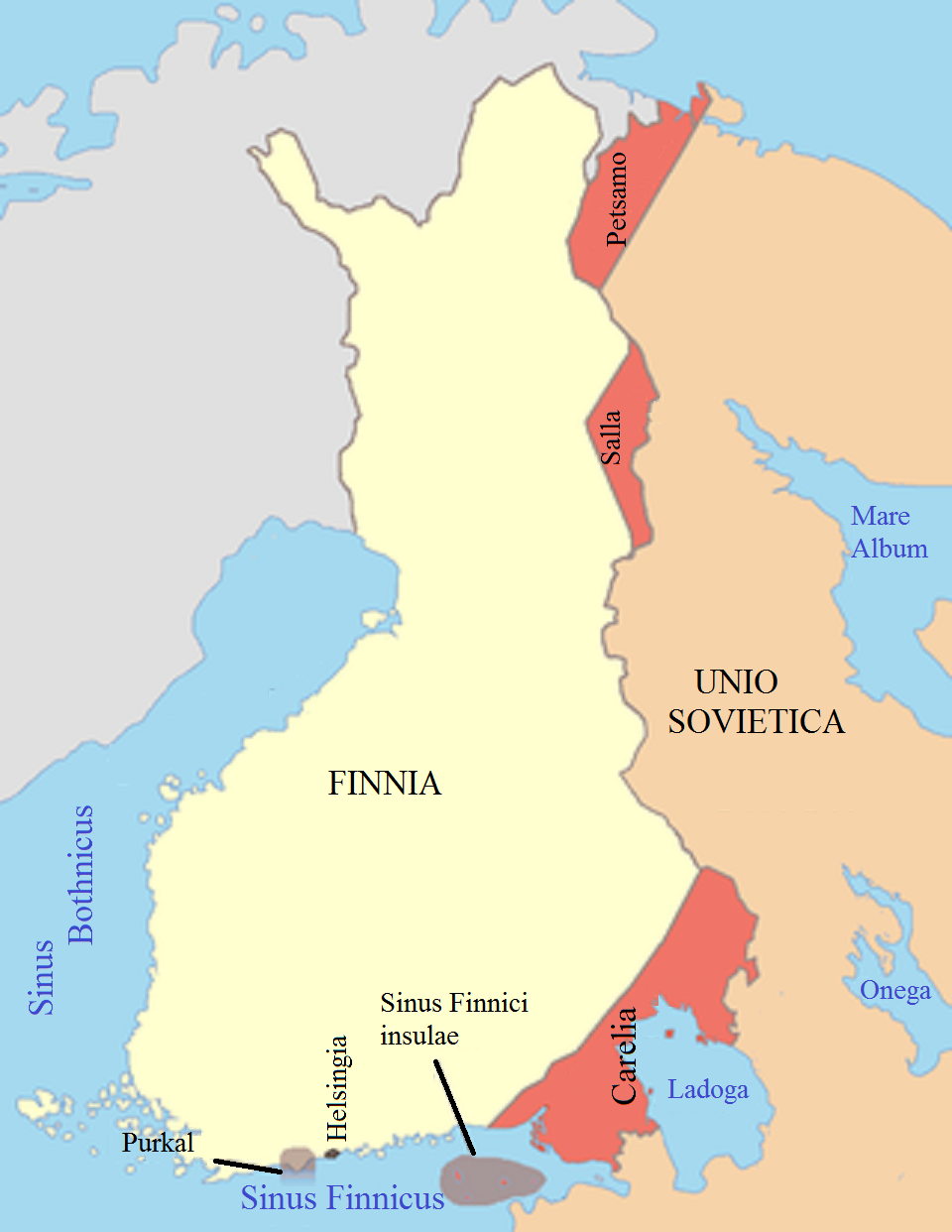 Finnicae areae cessae anno 1944